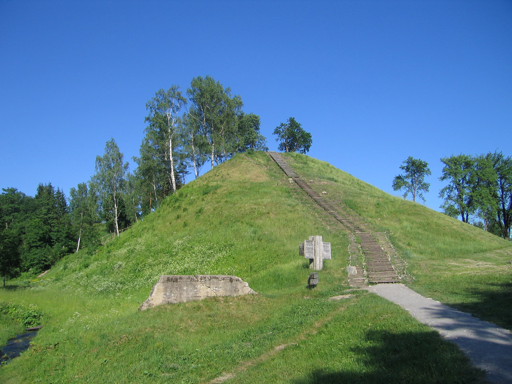 Merkinės-piliakalnis